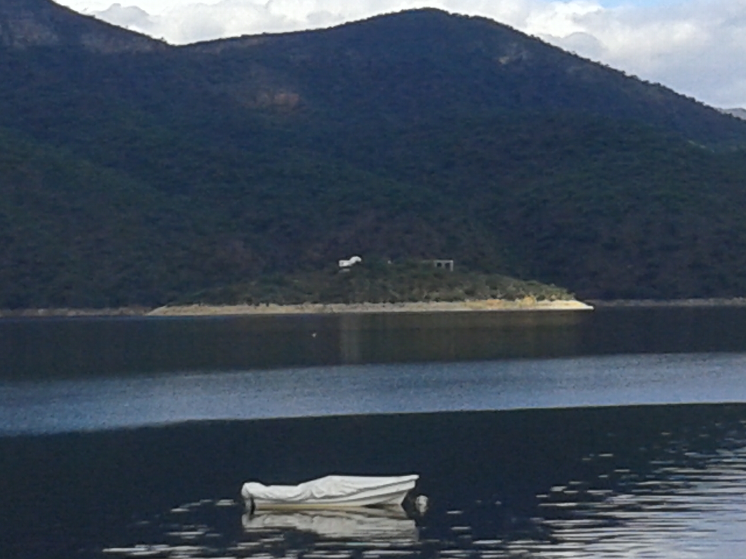 La Isla de los Deseos es una isla artificial del embalse Cabra Corral en el norte de Argentina.